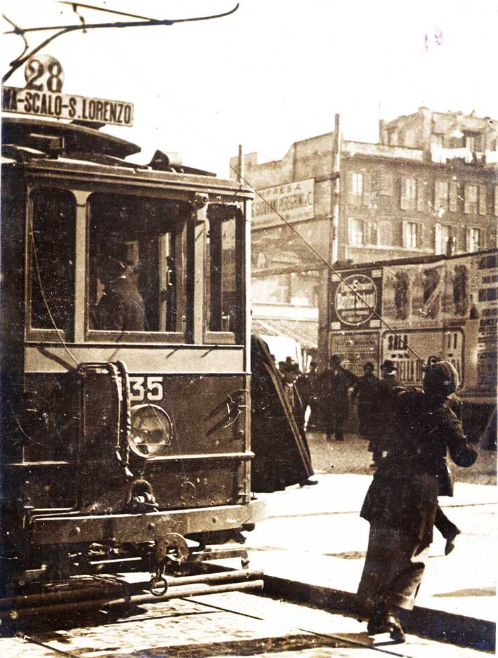 Donna conducente SRTO